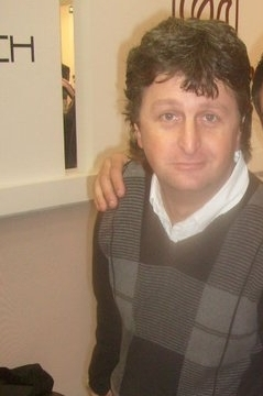 diego korol en tecnopolis